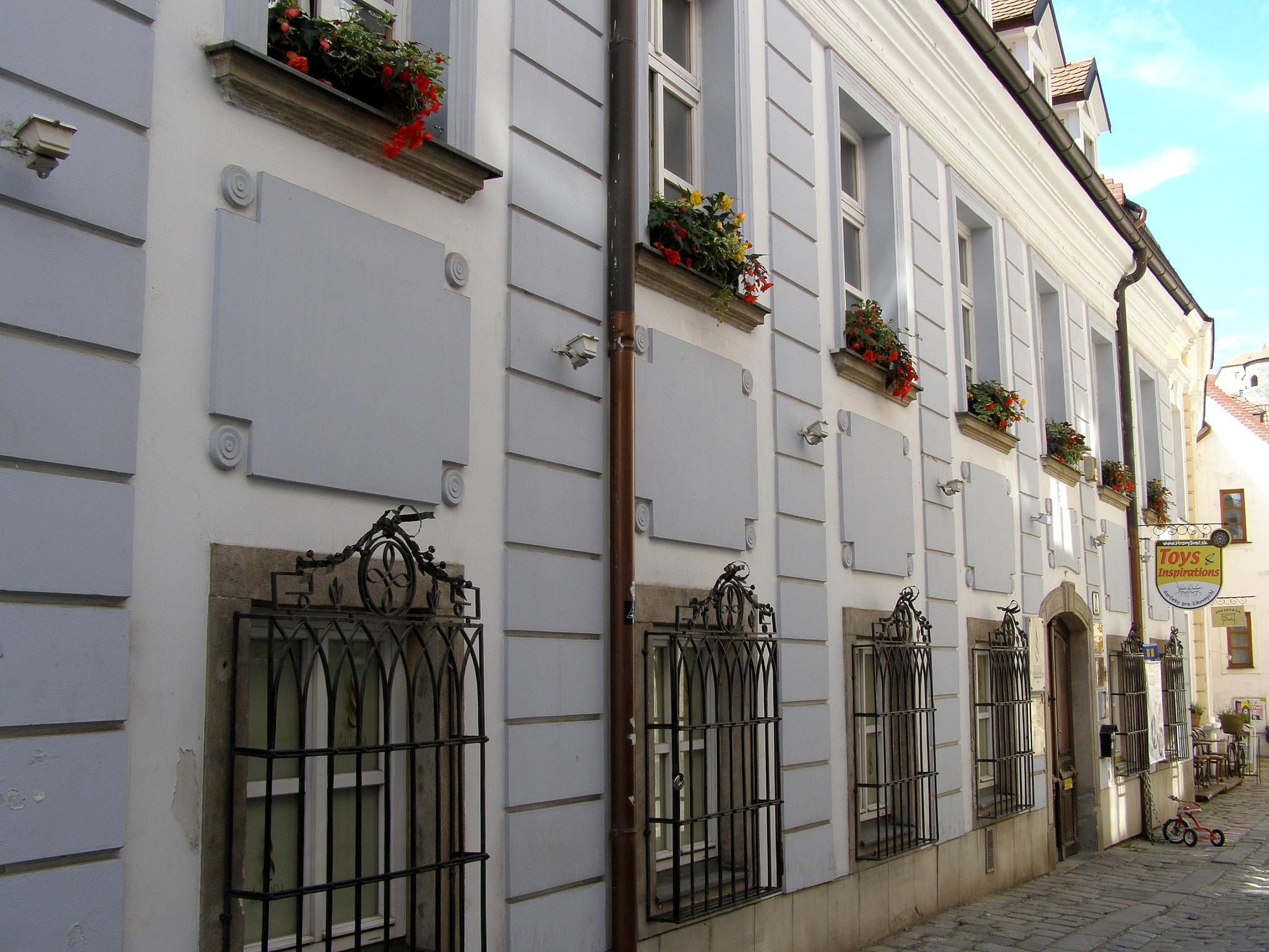 Baštová ul. č. 7 Object location48° 08′ 40.92″ N, 17° 06′ 20.16″ E